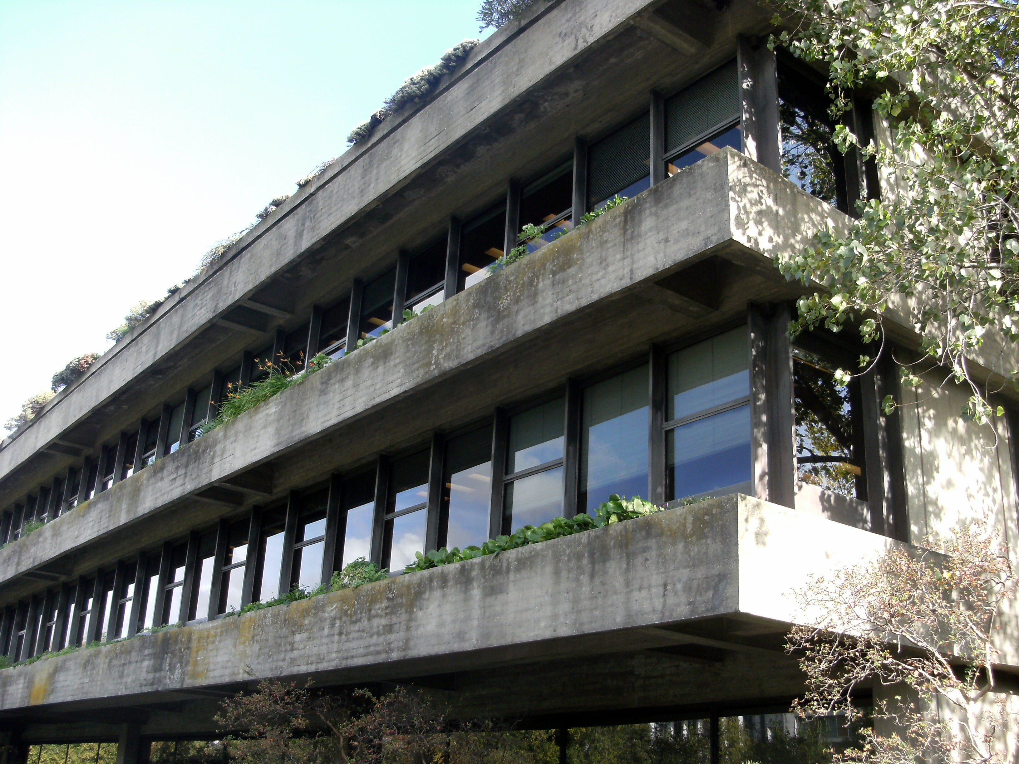 Lisbon